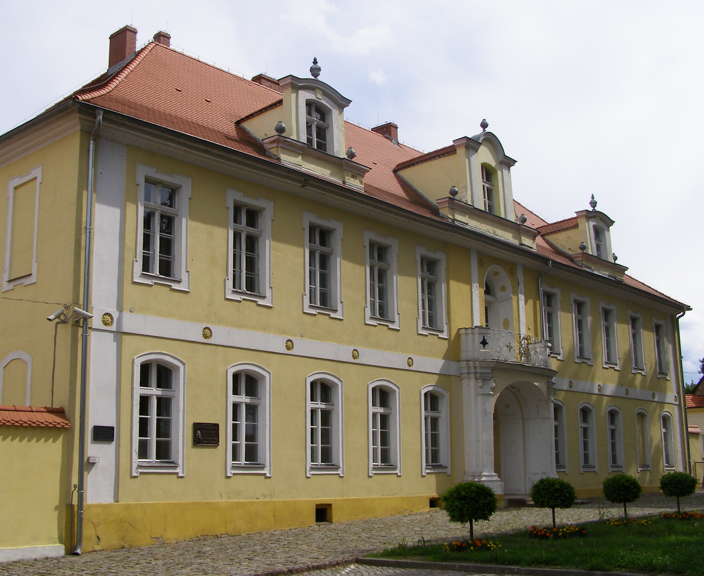 Drezdenko, pałac, ob. szkoła, XVIII